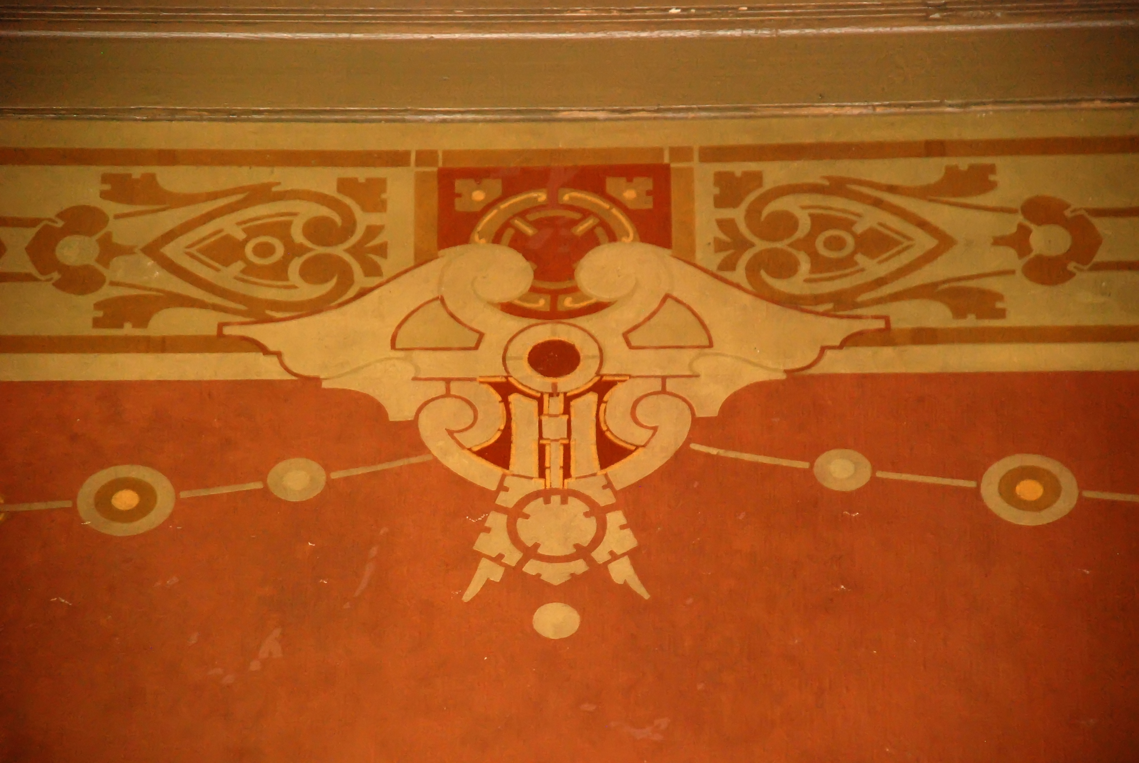 Belgique - Bruxelles - Bibliothèque Solvay